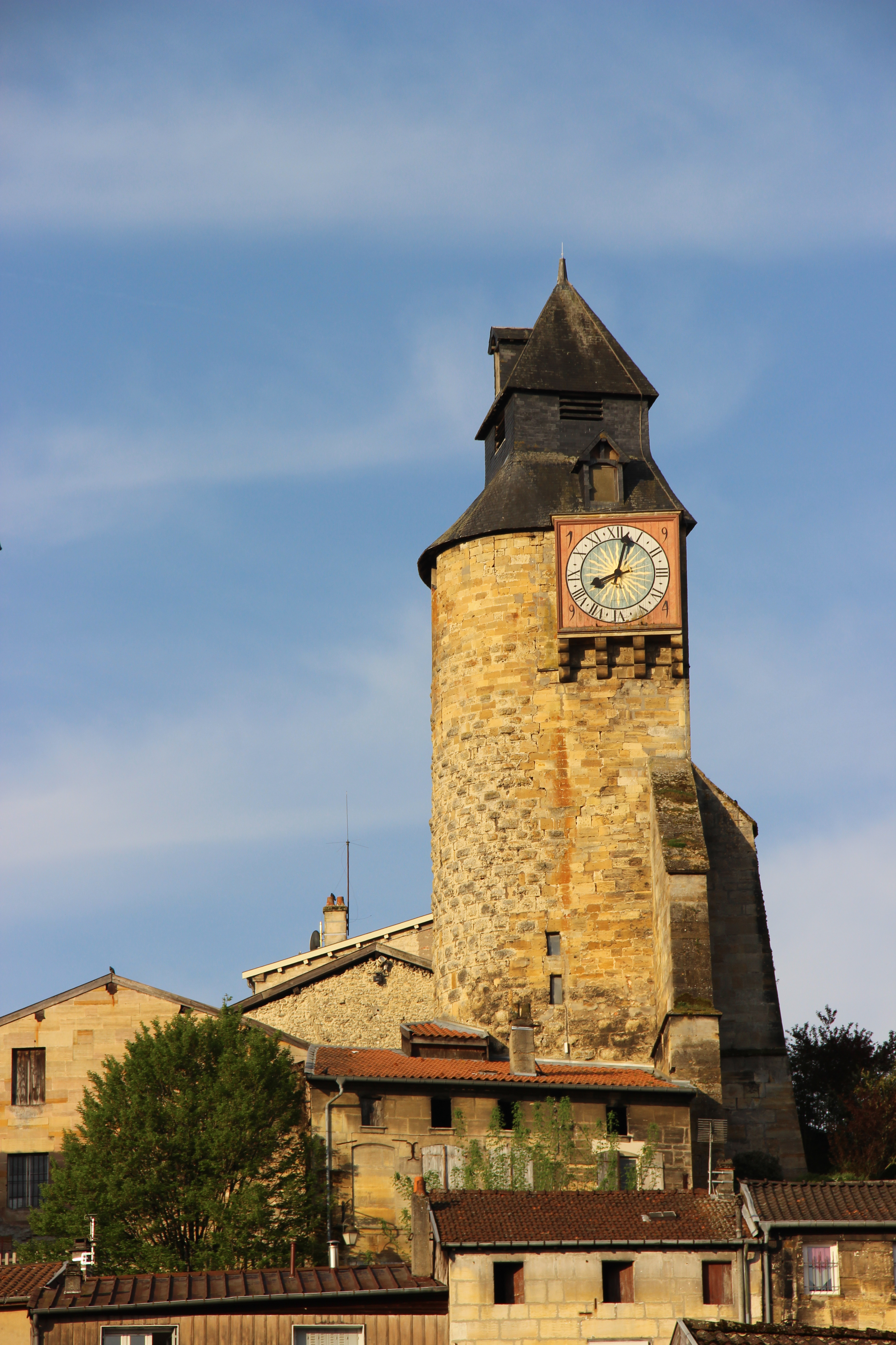 Tour de l'Horloge à Bar-le-Duc.